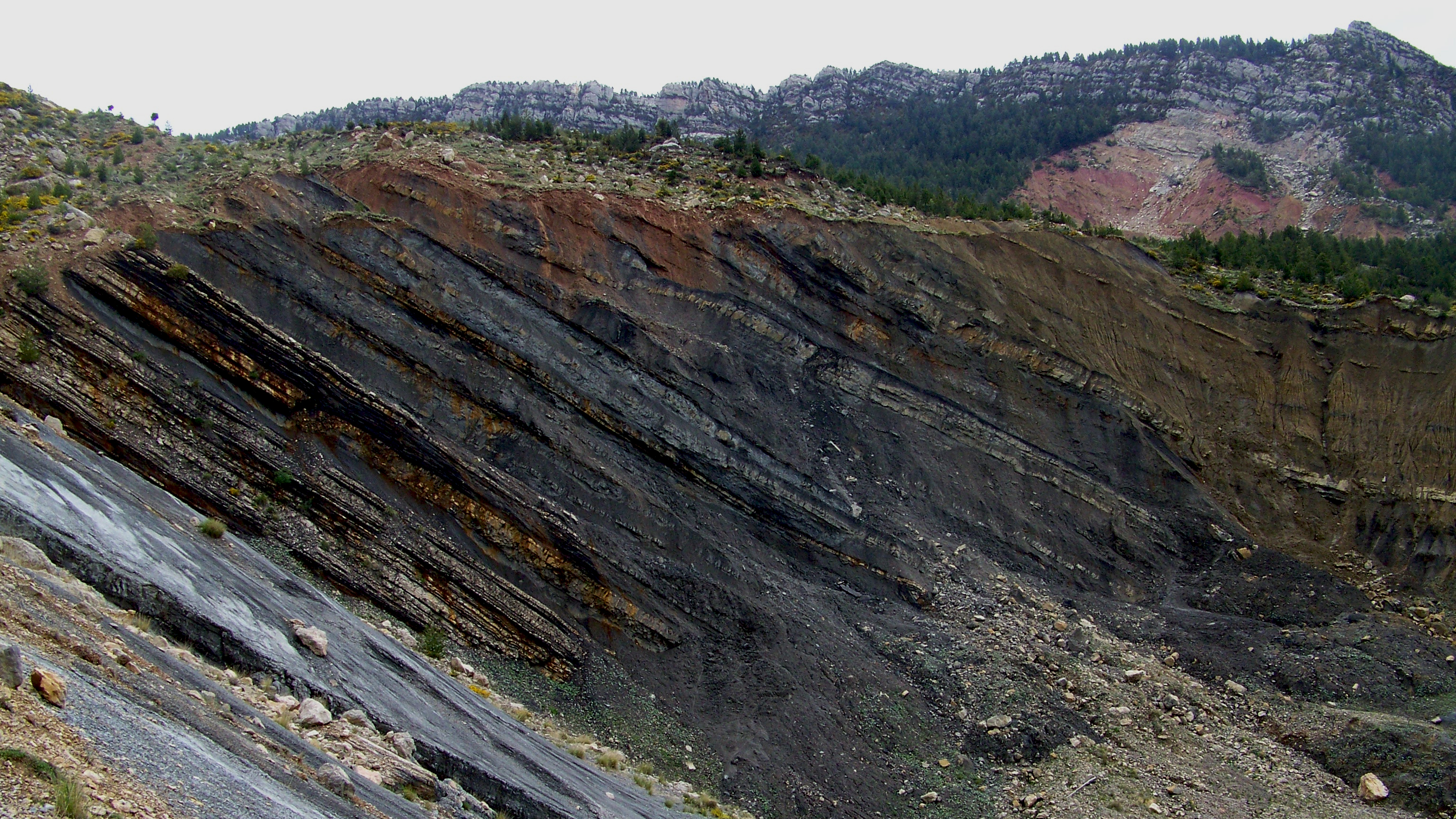 Imatge del jaciment de Mina Tumí on es pot veure exposada la sèrie complerta de la Formació Tremp des del Membre Fumanya fins a la Calcària de Vallcebre.